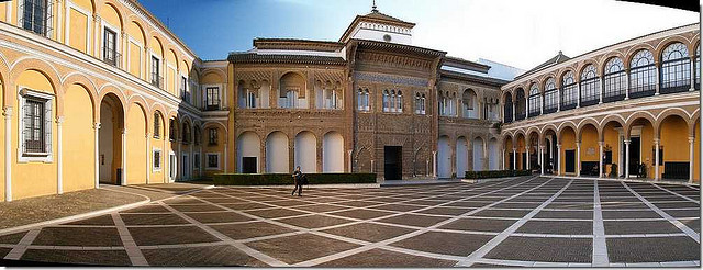 cour d'entrée